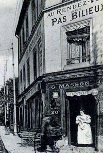 Rue Saint-Honoré à Saint-Maur, un restaurant dont le nom fait allusion à une société bigophonioque : Au Rendez-vous des Pas bilieux.